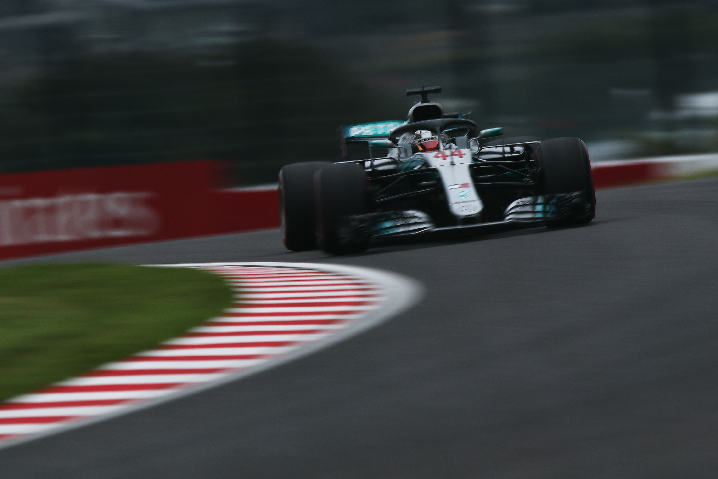 Lewis Hamilton driving his Mercedes F1 W09 EQ Power+ in Suzuka during FP2 (5 October 2018).